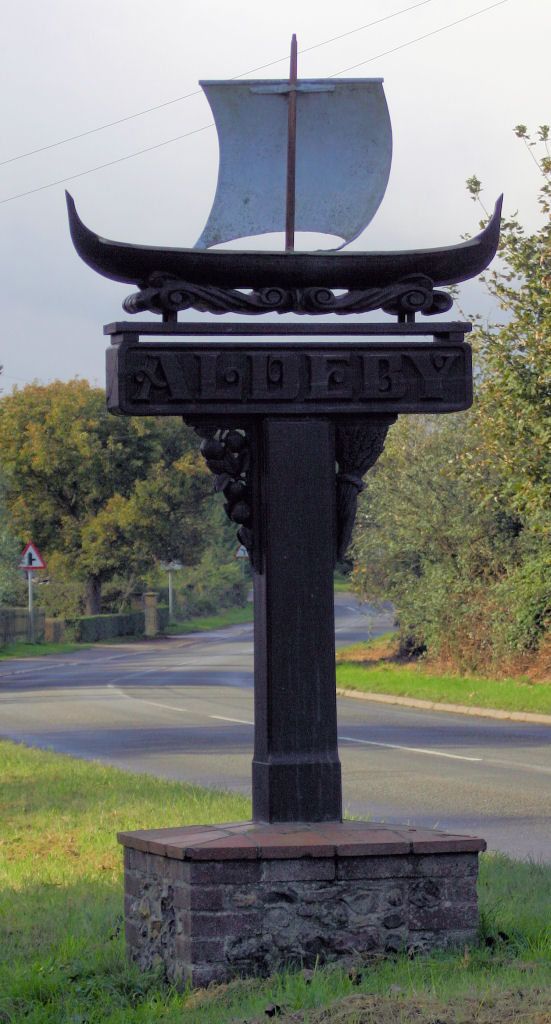 Aldeby Village Sign.